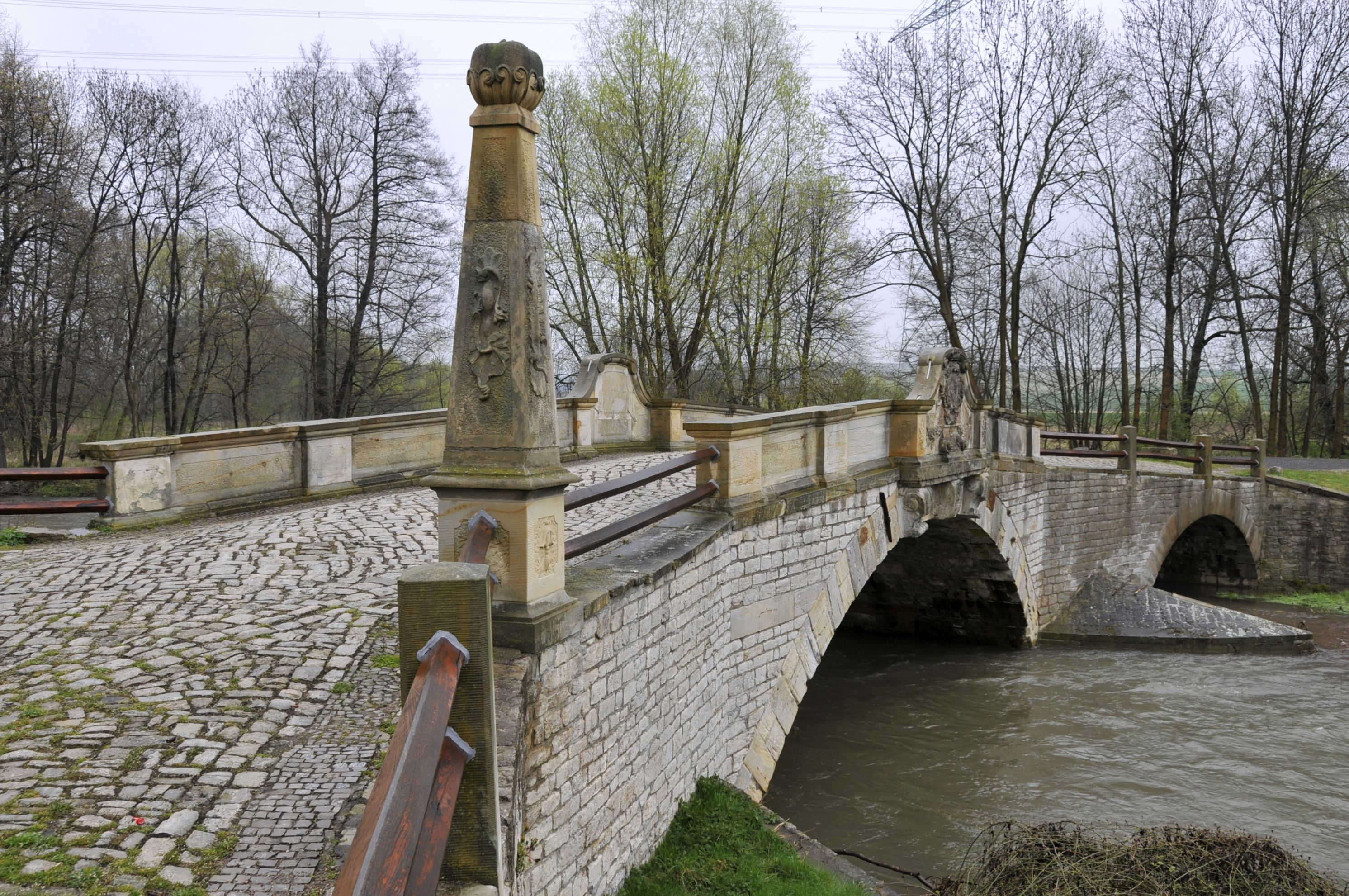 Marienthalbruecke, Nordwestseite